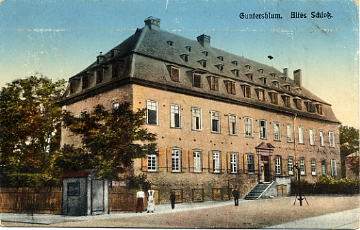 Das Guntersblumer Leininger Schloss im Jahr 1917 in Rheinhessen (Deutschland)